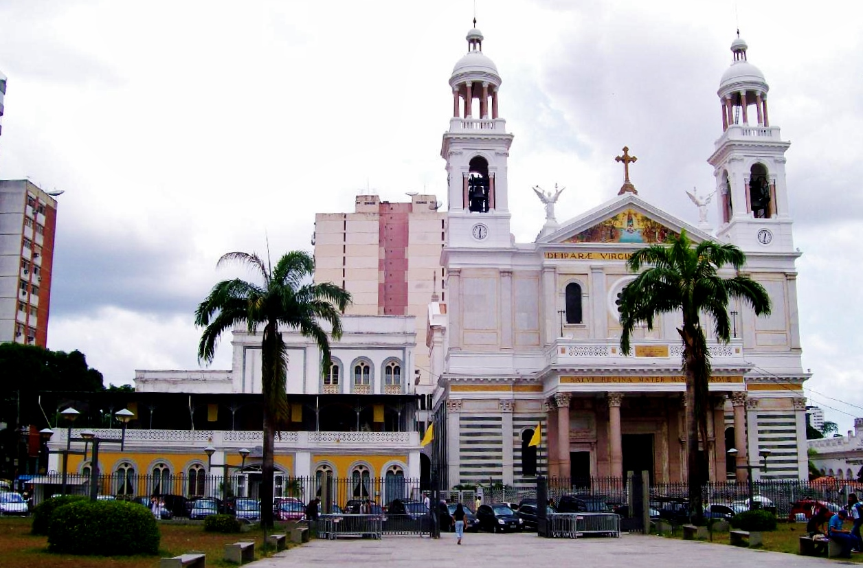 Conjunto Arquitetônico de Nazaré (CAN), tendo ao fundo a Basílica de Nossa Senhora de Nazaré, um dos mais importantes templos católicos do estado do Pará.